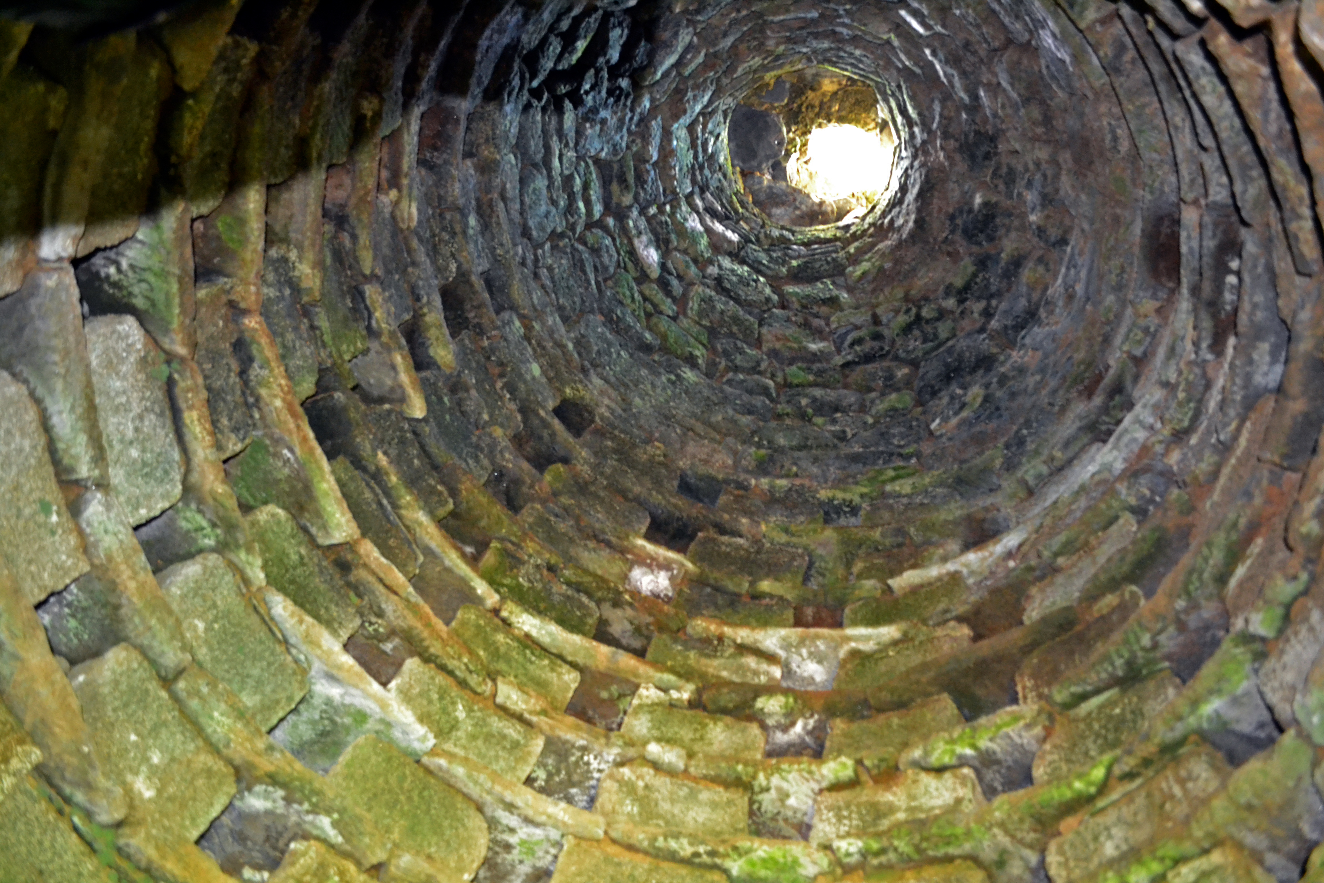 Intérieur du pigeonnier de Kerrigou (du nom d'un manoir disparu) près de la chapelle Saint-Charles-Borromée à Saint-Pol-de-Léon.